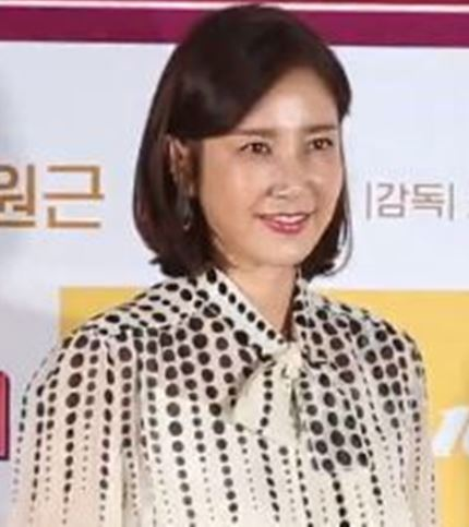 영화 '그대 이름은 장미' 언론시사회